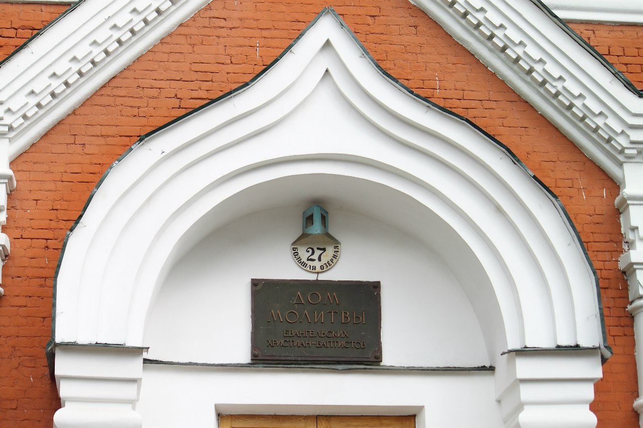 Баптистская церковь в Санкт-Петербурге